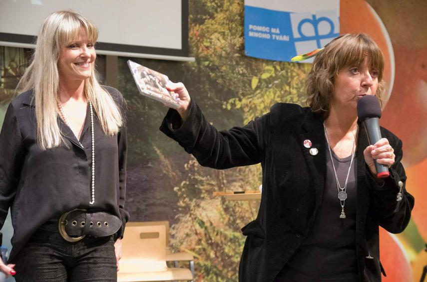 Chantal Poullain a Bára Hrzánová na společnském večeru s aukcí 2015